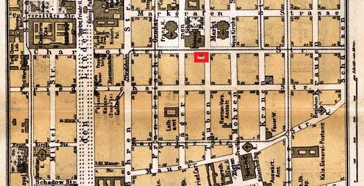 Ausschnitt aus The New English Illustrated Berlin Guide Unter dem Plan links: "Verlag von Albert Goldschmidt. Berlin". Unten rechts: "Druck von Grack & Aron. Berlin"